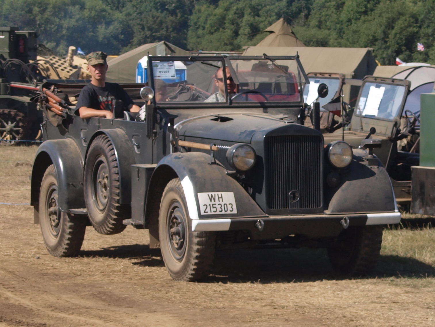 Horch Kfz.15 (1940) (owner Robert Lewszyk)